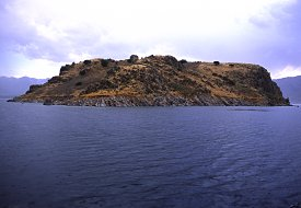 Остров Артер, Kuş adasi (Куш)